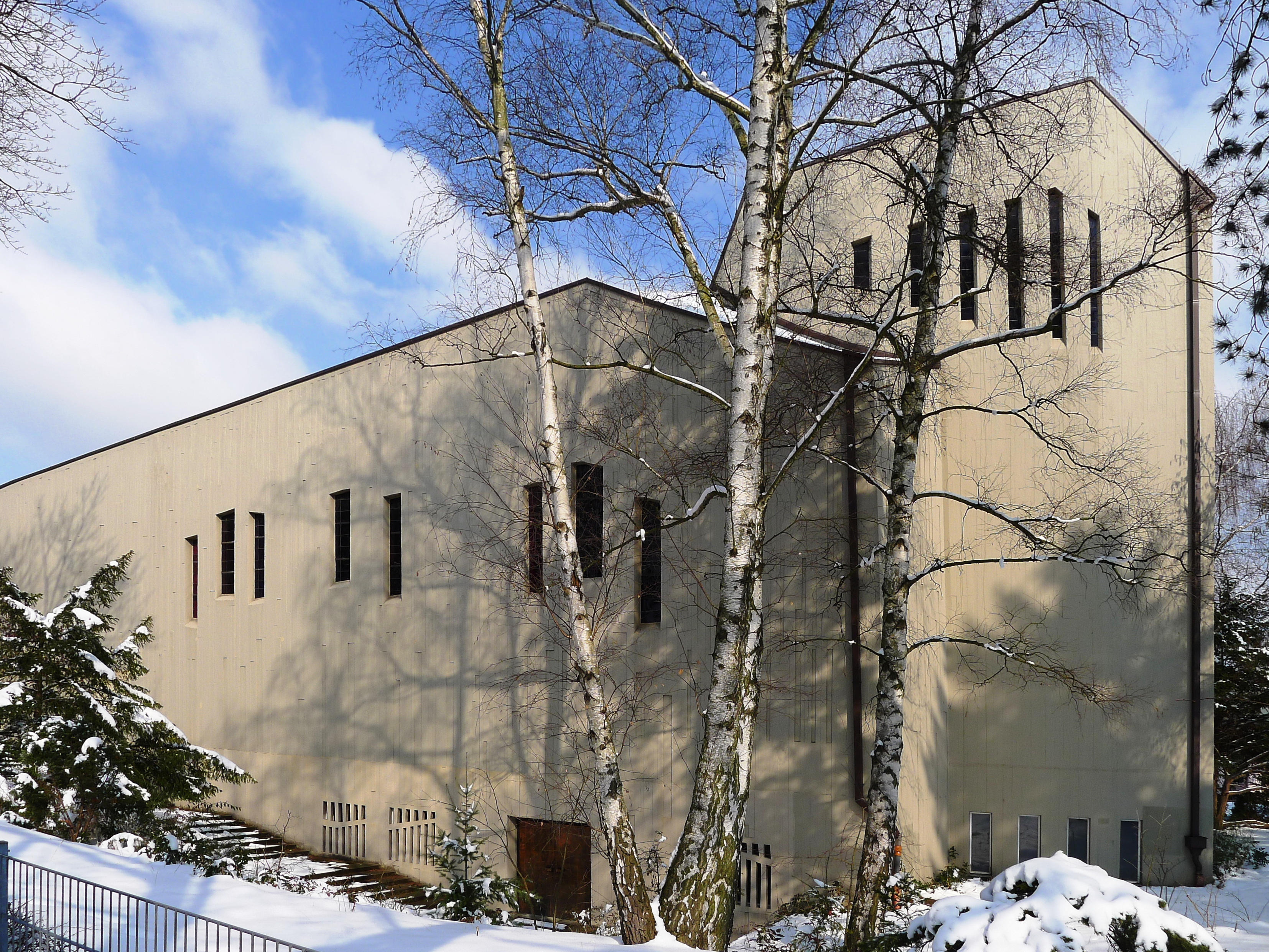 Blick von der Mansfelder Straße auf die Kirche.